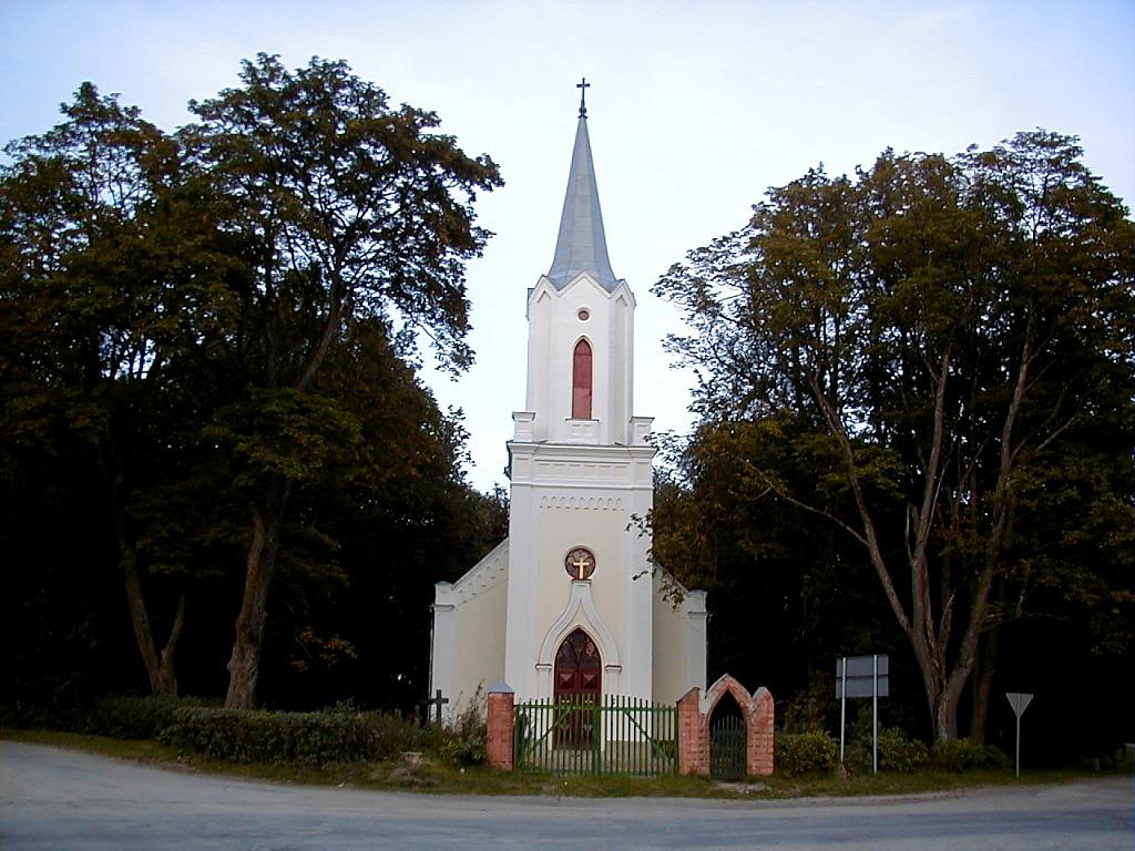 Bārbeles baznīca 2000-09-02